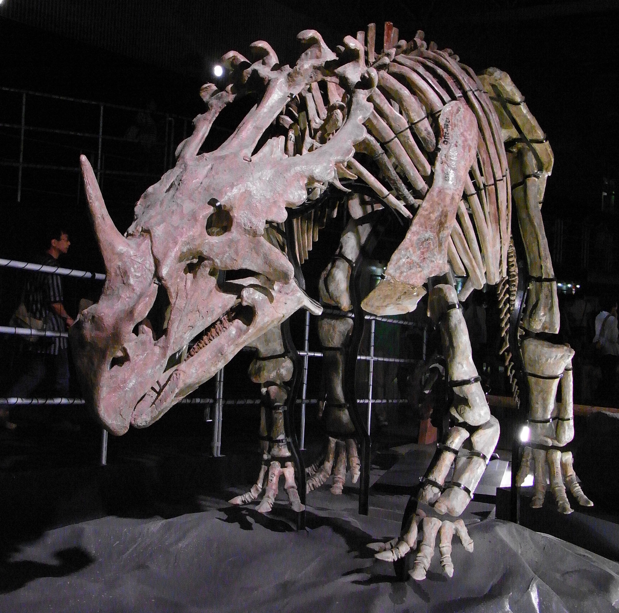 ぷるぷる・・・！